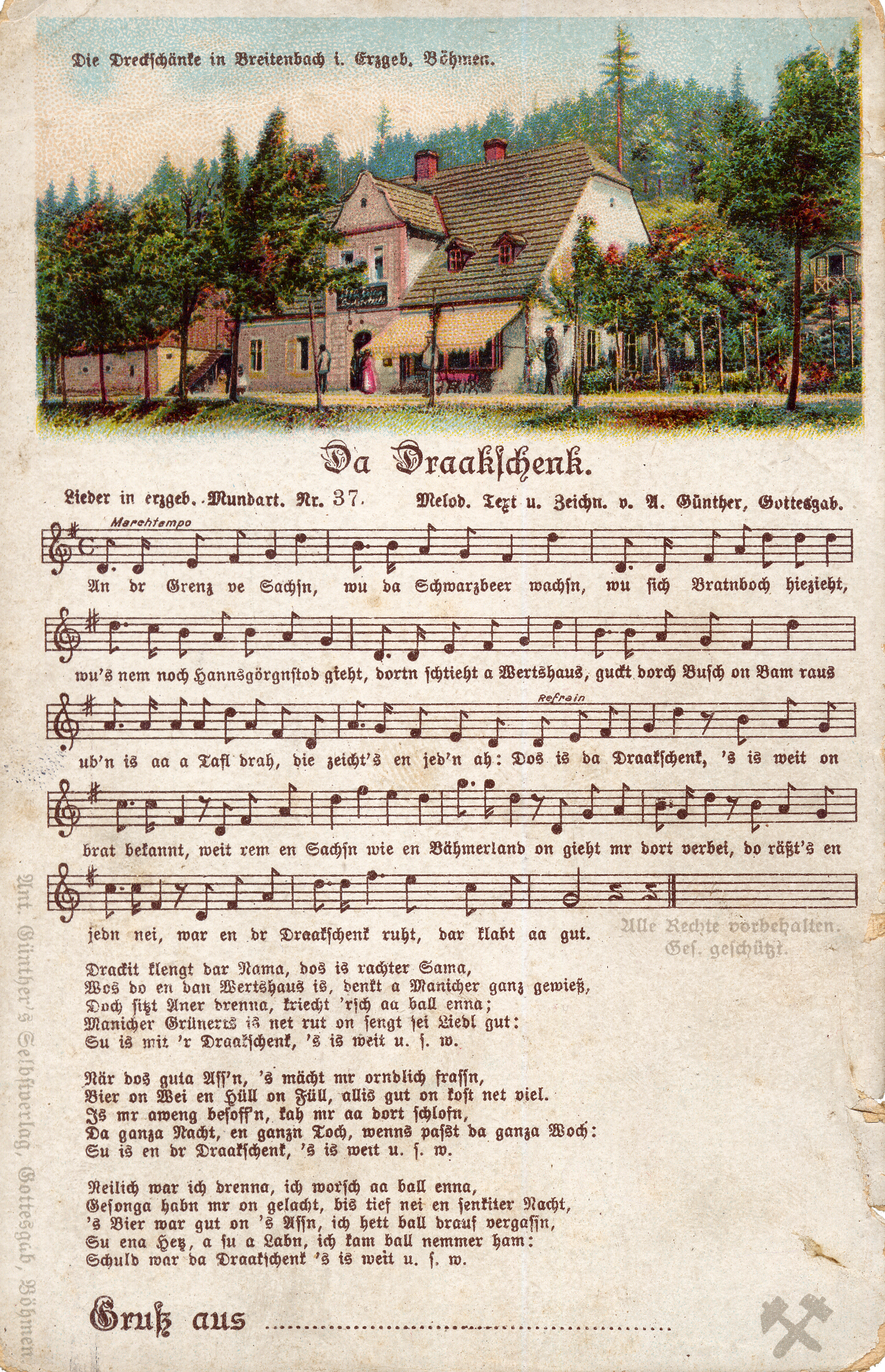 Die erste Version der Farblithographie-Liedpostkarte Da Draakschenk Nummer 37